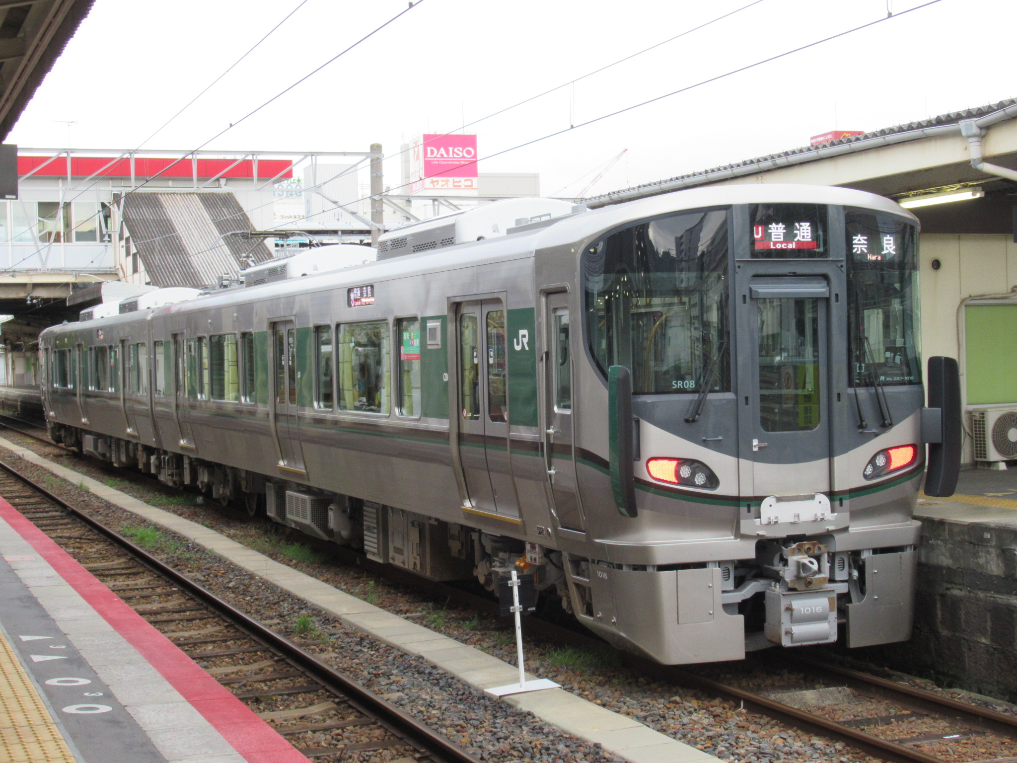 王寺駅に停車中の227系1000番台